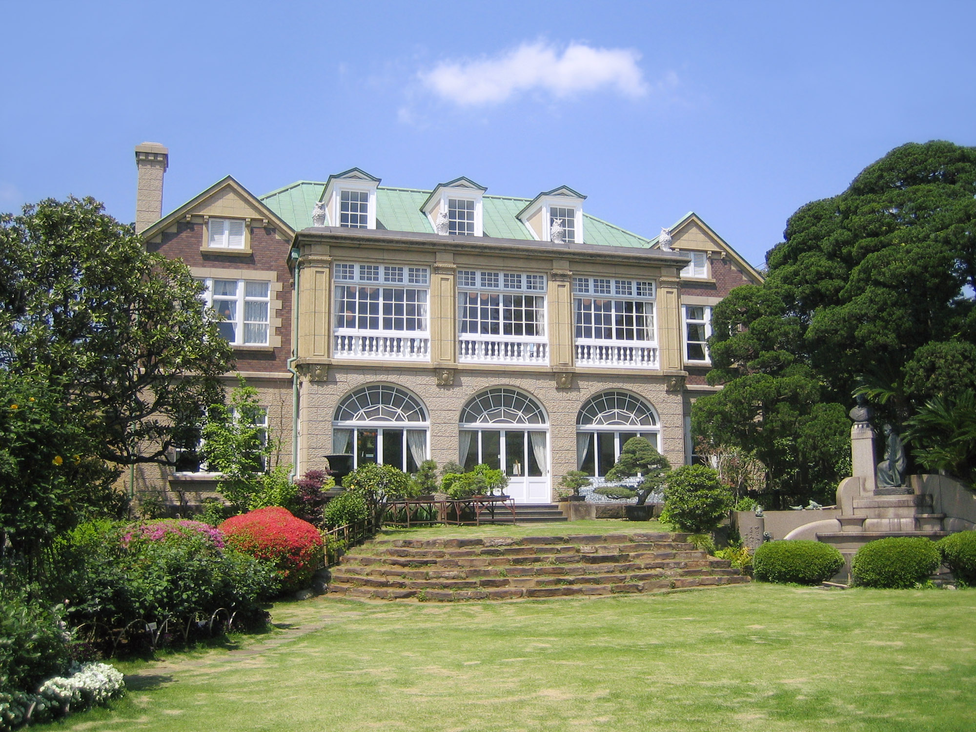 ja: 鳩山会館（音羽御殿）、東京都文京区音羽 en: Hatoyama Hall (Otowa Mansion), Otowa, Bunkyo, Tokyo